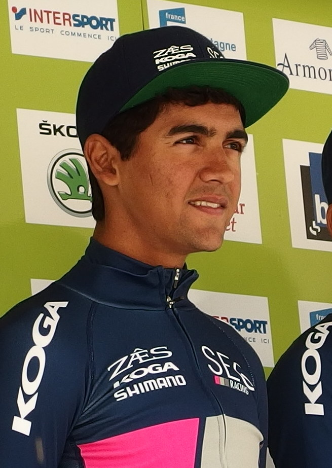 Tour de Bretagne 2015 - Présentation des équipes au départ de la troisième étape à Baud - Équipe SEG Racing Depicted person: Alex Peters